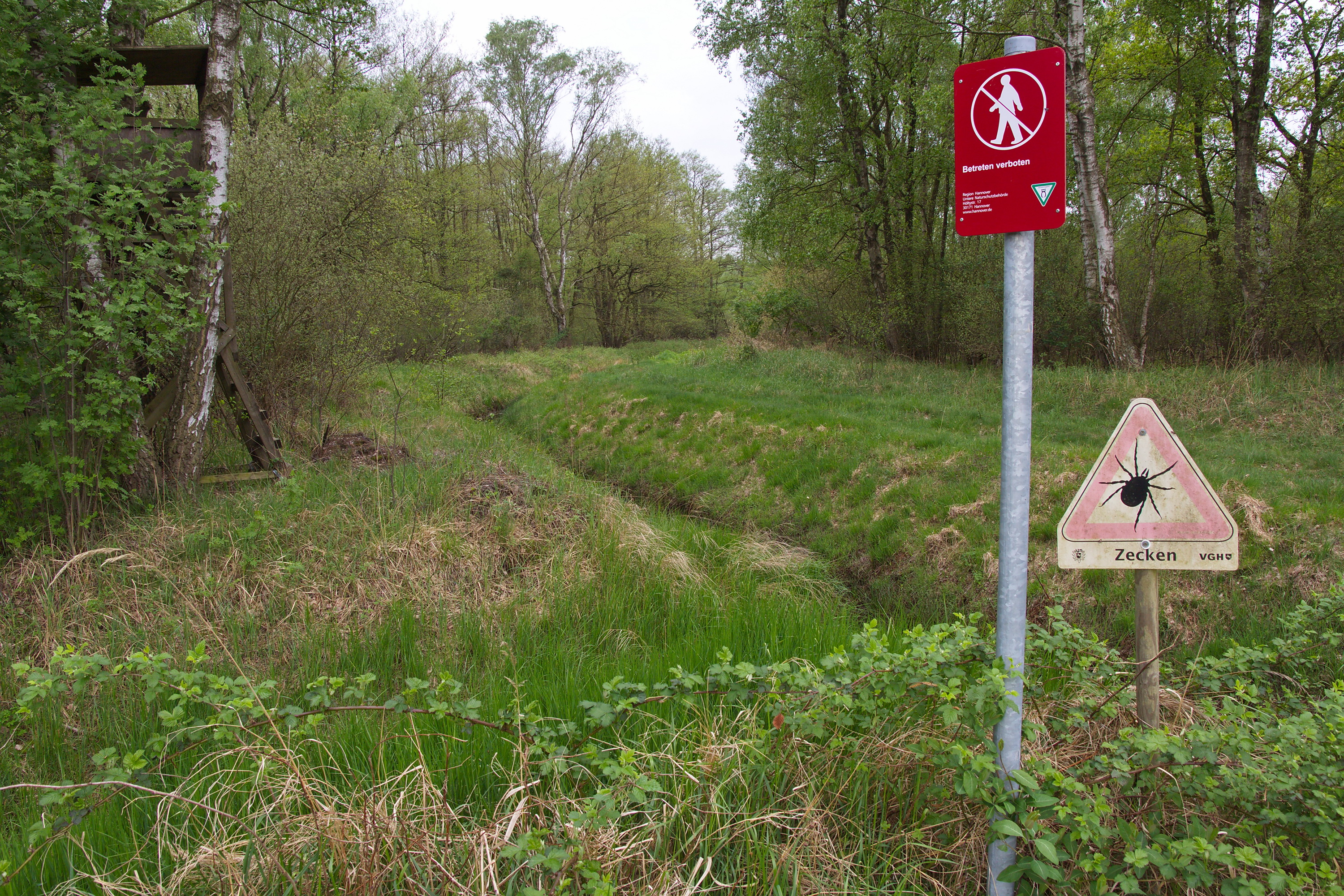 Helstorfer Moor (Wedemark), Niedersachsen, Deutschland.